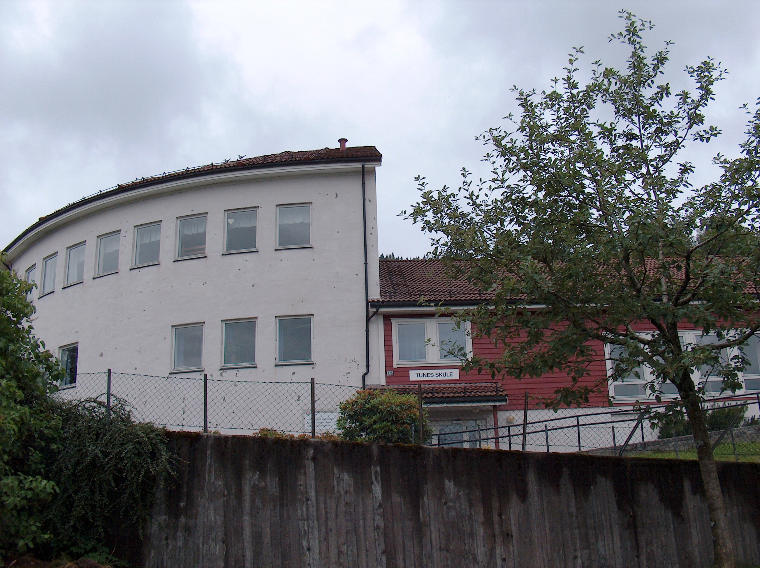 Tunes skule